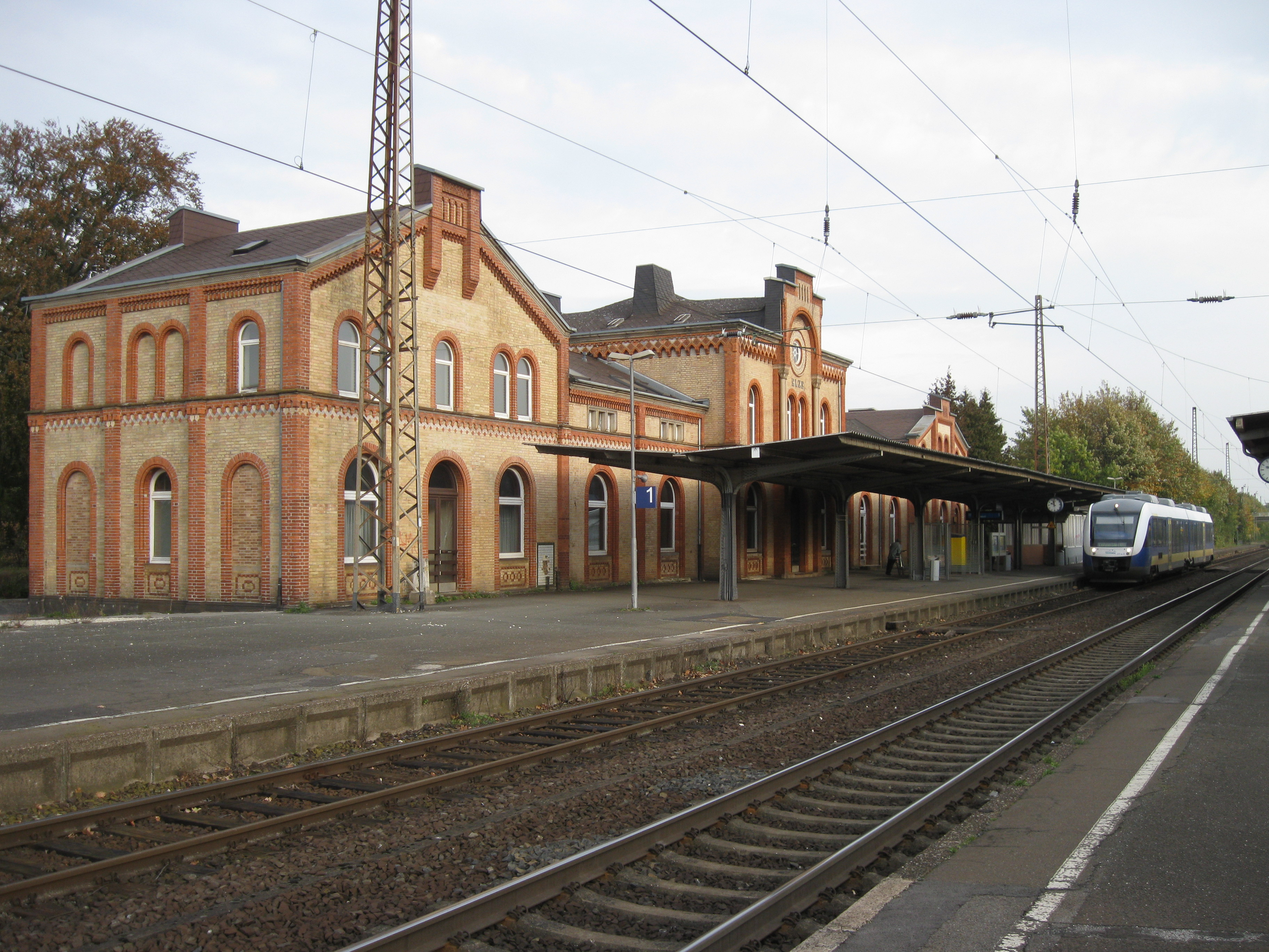 Banegården i Elze, Tyskland